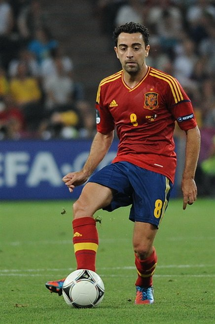 Xavi Hernández at Euro 2012 match Spain-France